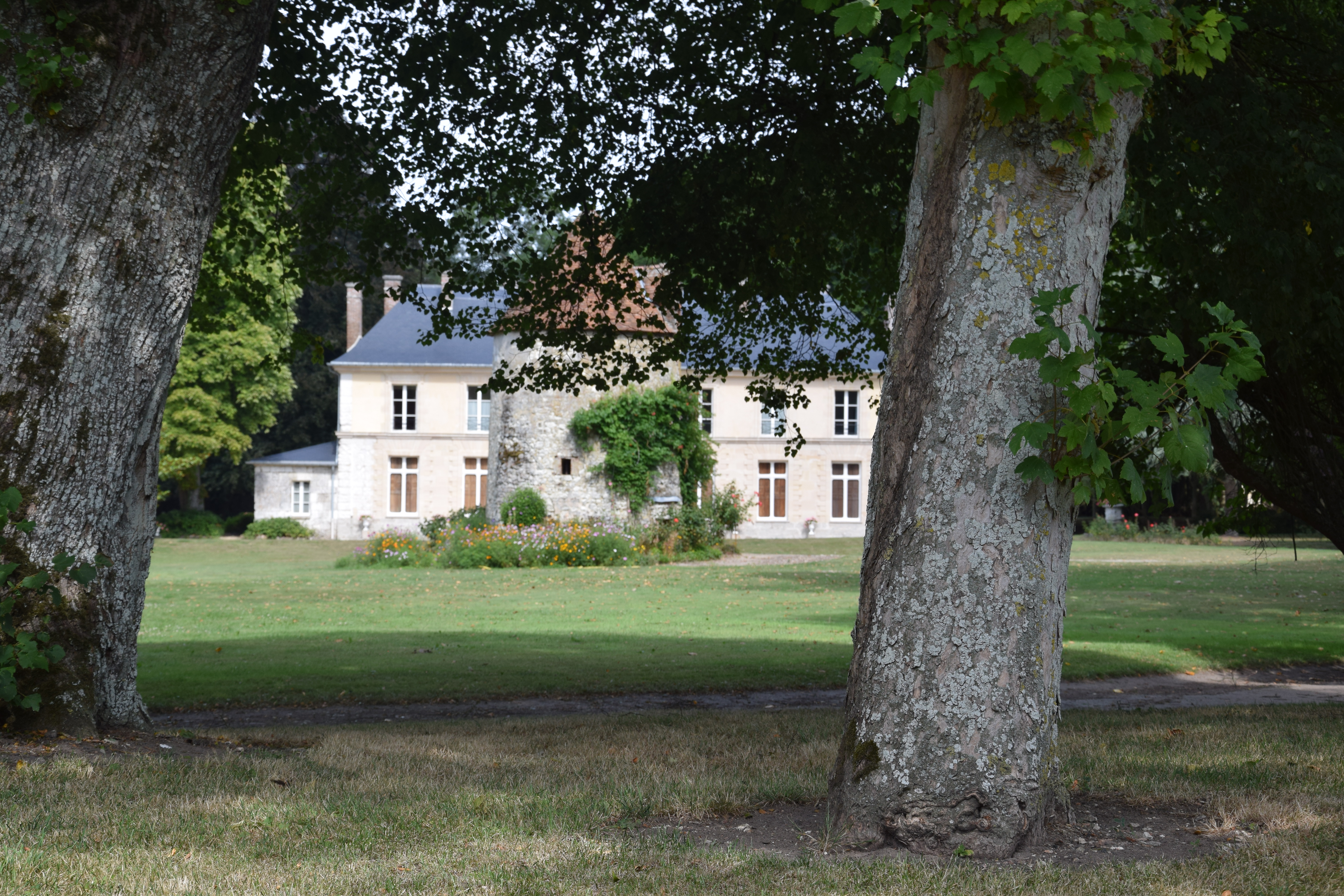 colombier Abbaye Saint-Germer-de-Fly